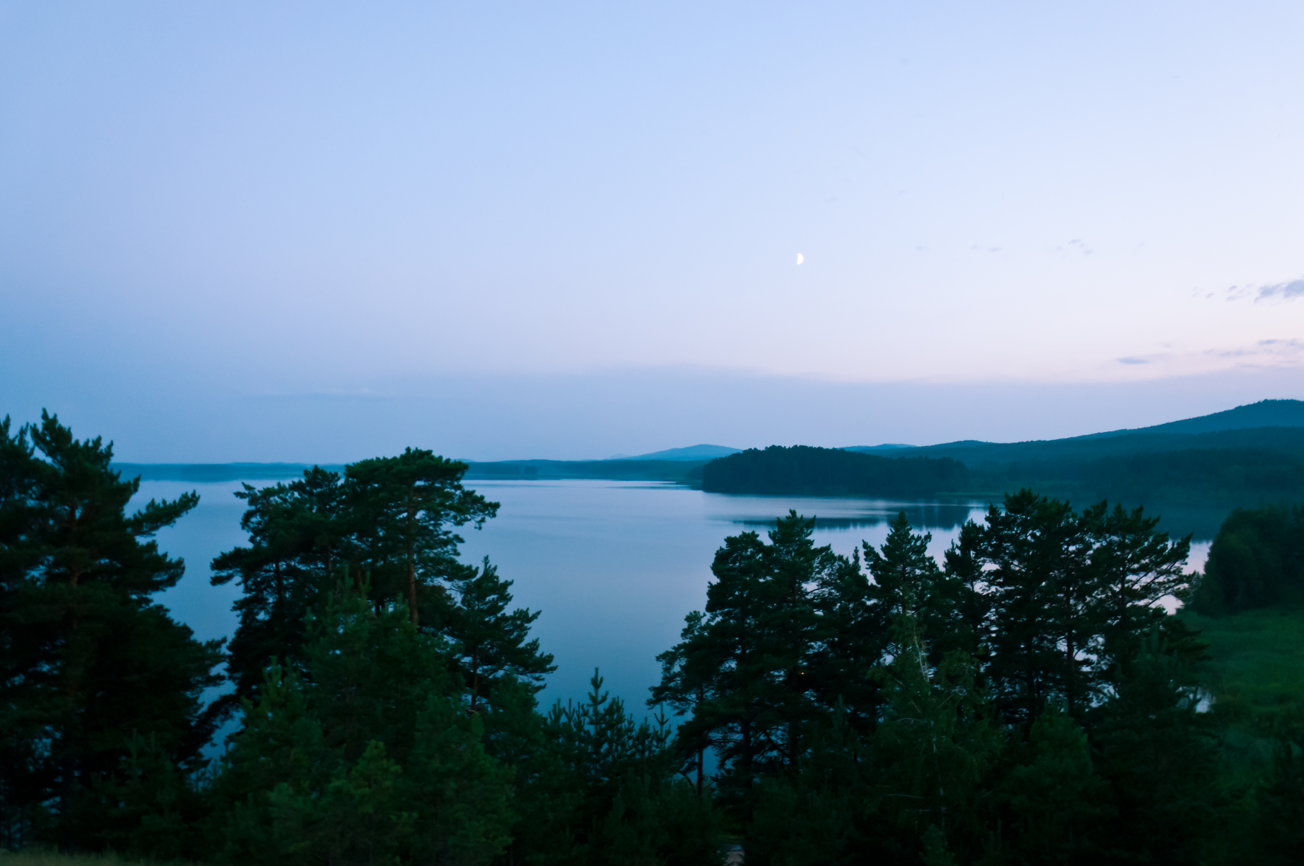 Озеро Сугомак, Кыштымский городской округ This image is related to the protected area of Russia number 7410191